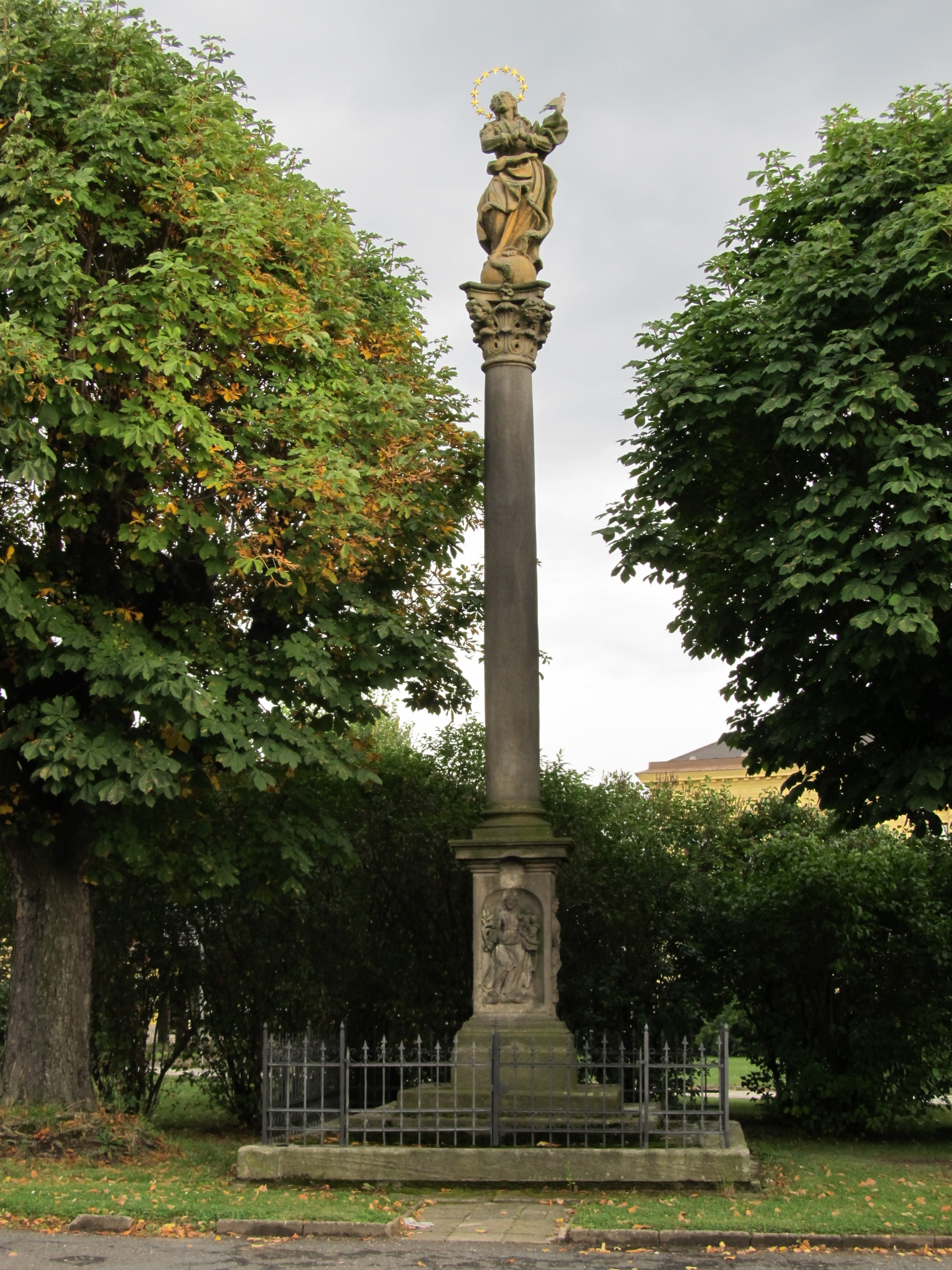 Sloup se sochou P. Marie (Česká Skalice), Husovo nám., Česká Skalice